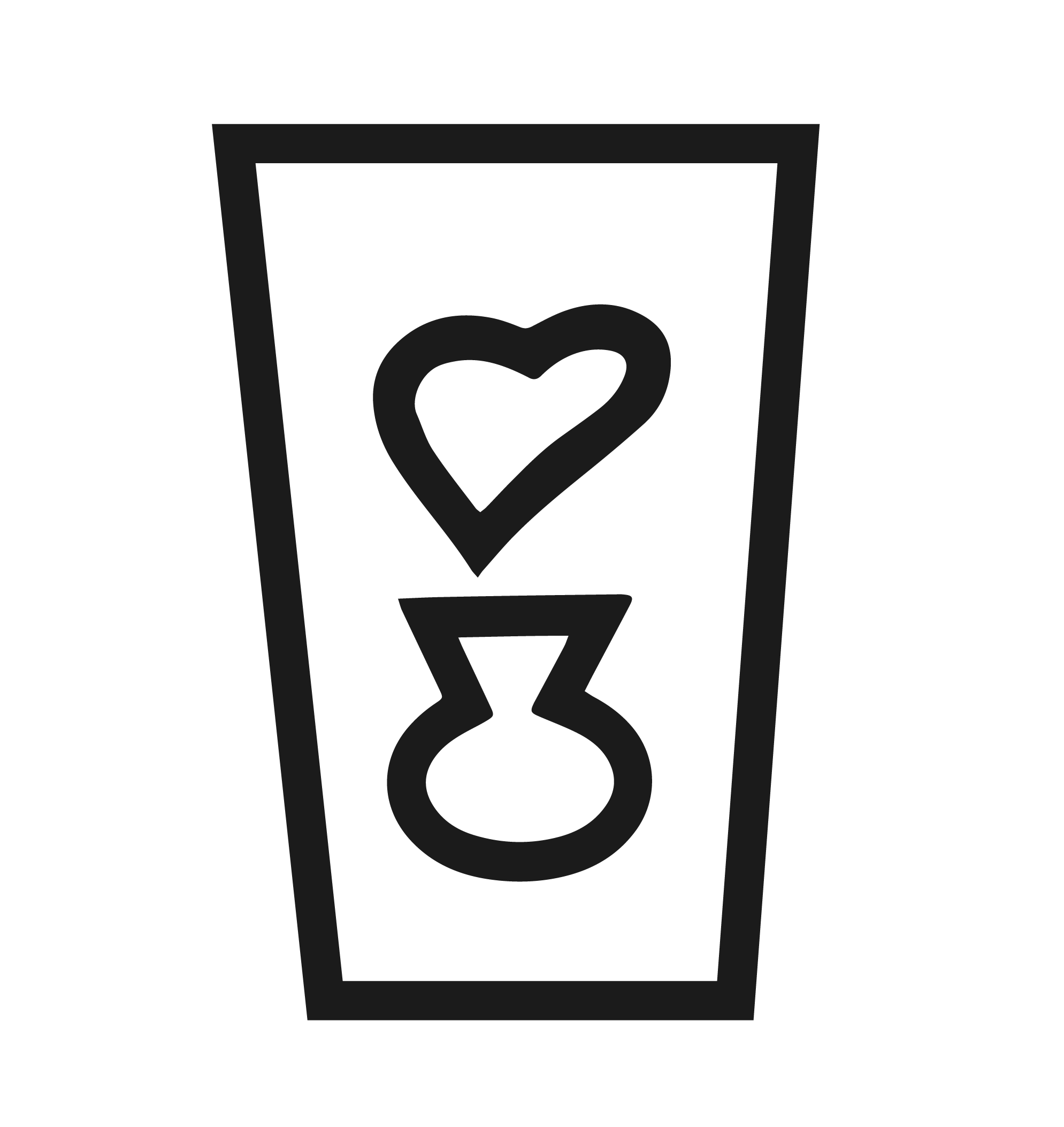 Escudo del pueblo de Labros en honor y agradecimiento al reinado de Carlos III, el Rey rico (bolsa), y generoso (corazón), el cual hizo construir por los pueblos, graneros de semillas, para prestar simientes a los labradores pobres.